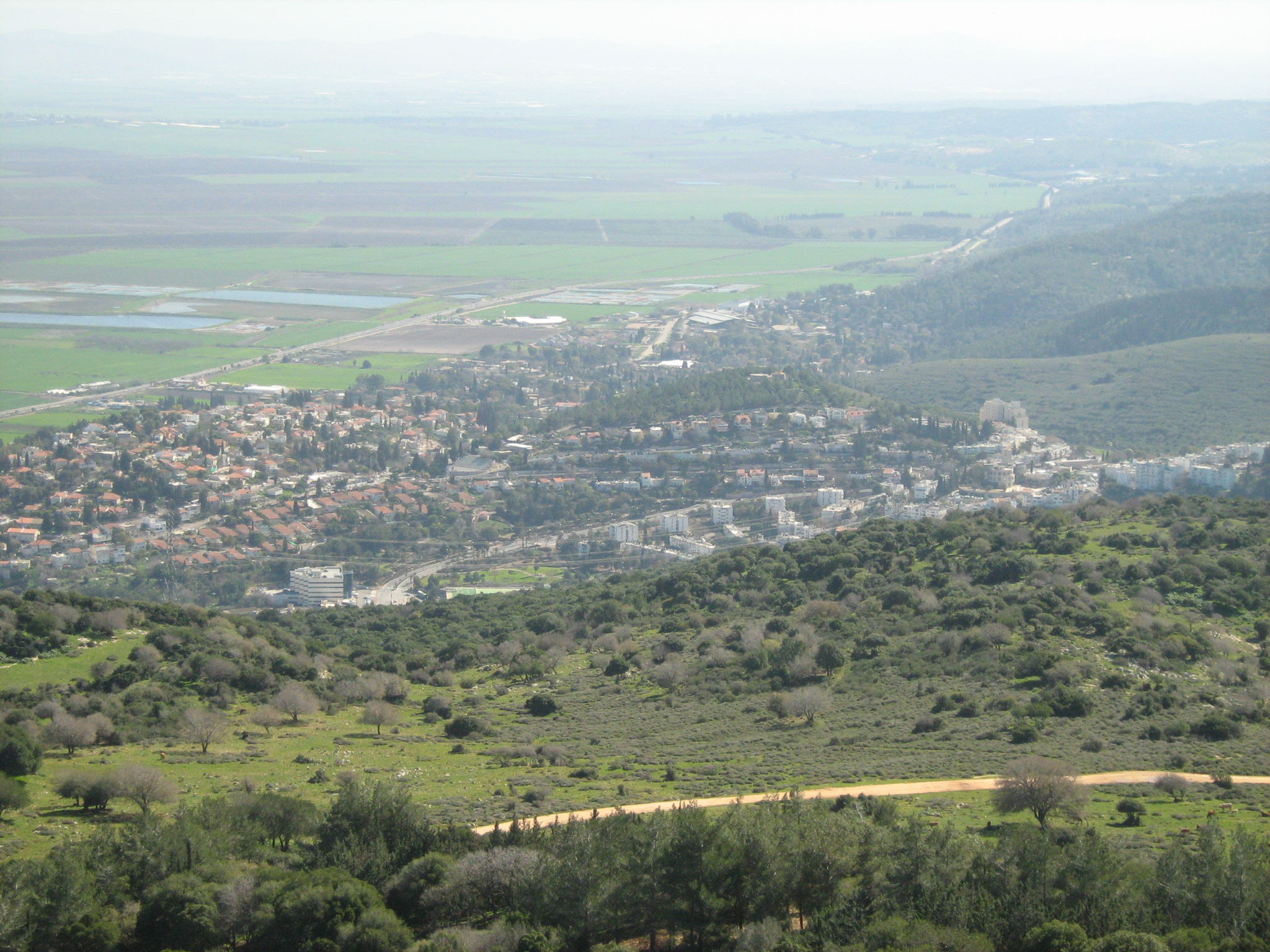 המראה מגג המנזר בקרן הכרמל